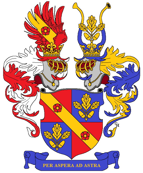 Wappen des österreichischen Finanzjuristen Johann Adolf Wagner (1835–1917), verliehen anlässlich seiner Erhebung in den österreichischen Ritterstand mit dem Prädikat "von Jauregg" 1883. Zeichnung von Gerd Hruška ( Für weitere Informationen zu dieser Standeserhebung siehe (